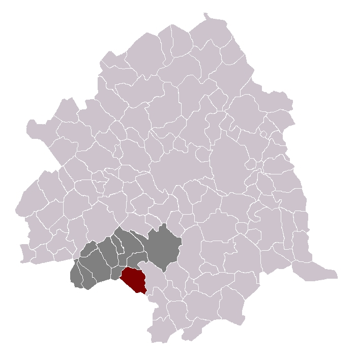 Camphin-en-Carembault dans son canton et son arrondissement